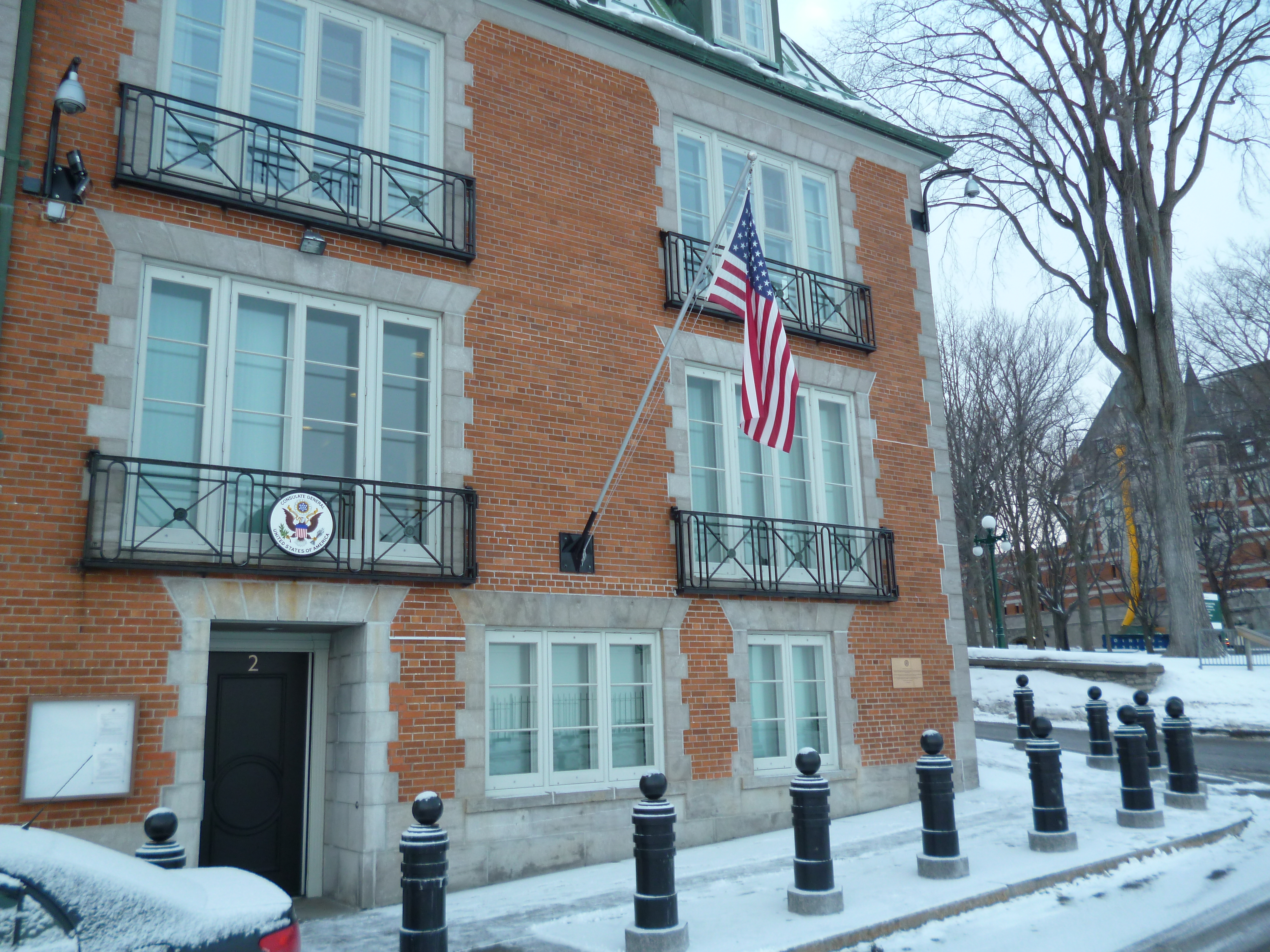 Le consulat général des Etats-Unis à Québec.